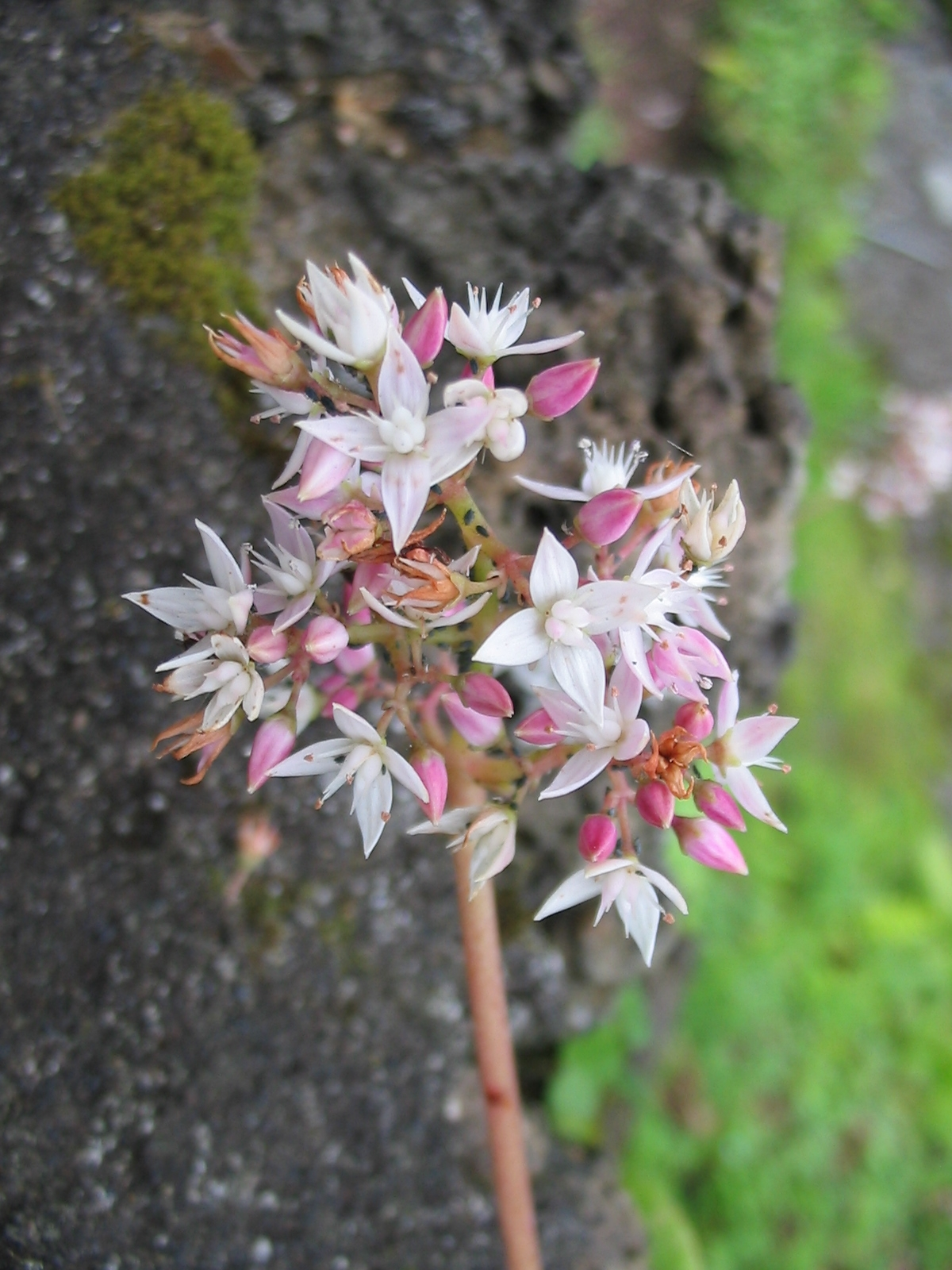 Crassula multicava - Blüte